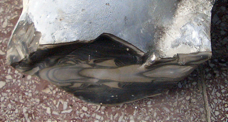 Rohknolle Bänderflint, Museum Krzemionki